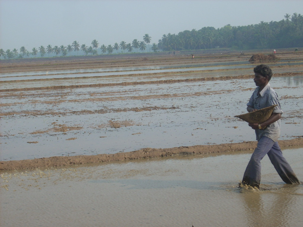 വയല്‍കാഴ്ചകള്‍. അടാട്ട്, ഒമ്പതുമുറി പാടം, തൃശ്ശൂര്‍ This media file is uploaded with Malayalam loves Wikimedia event - 2.